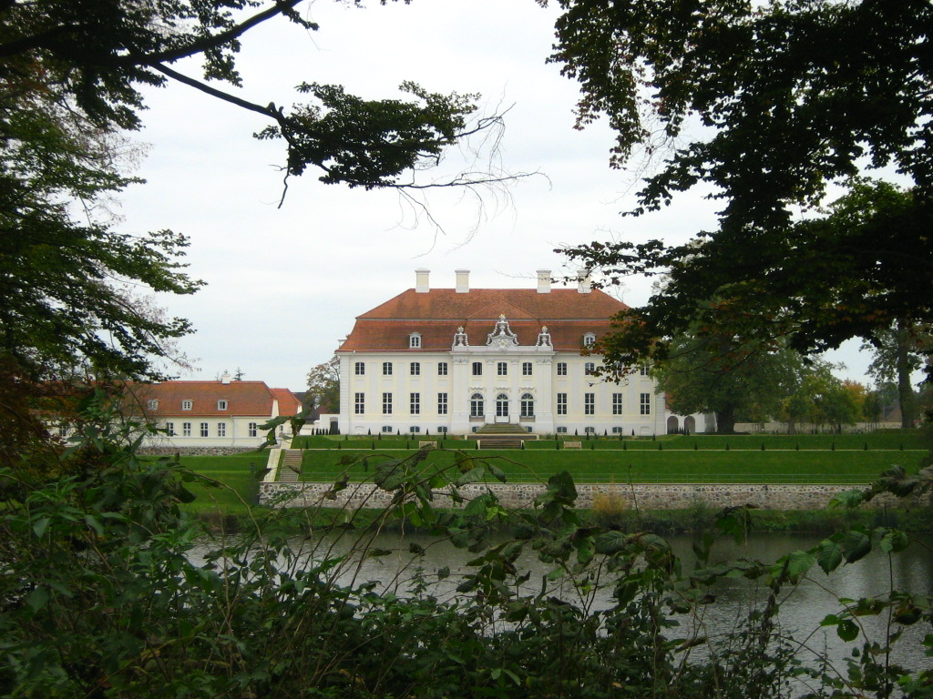 Schloss Meseberg, erbaut 1737, ist ein Barockschloss in Meseberg, einem Ortsteil der Stadt Gransee im Landkreis Oberhavel, Land Brandenburg. Es wird als Gästehaus der deutschen Bundesregierung genutzt.